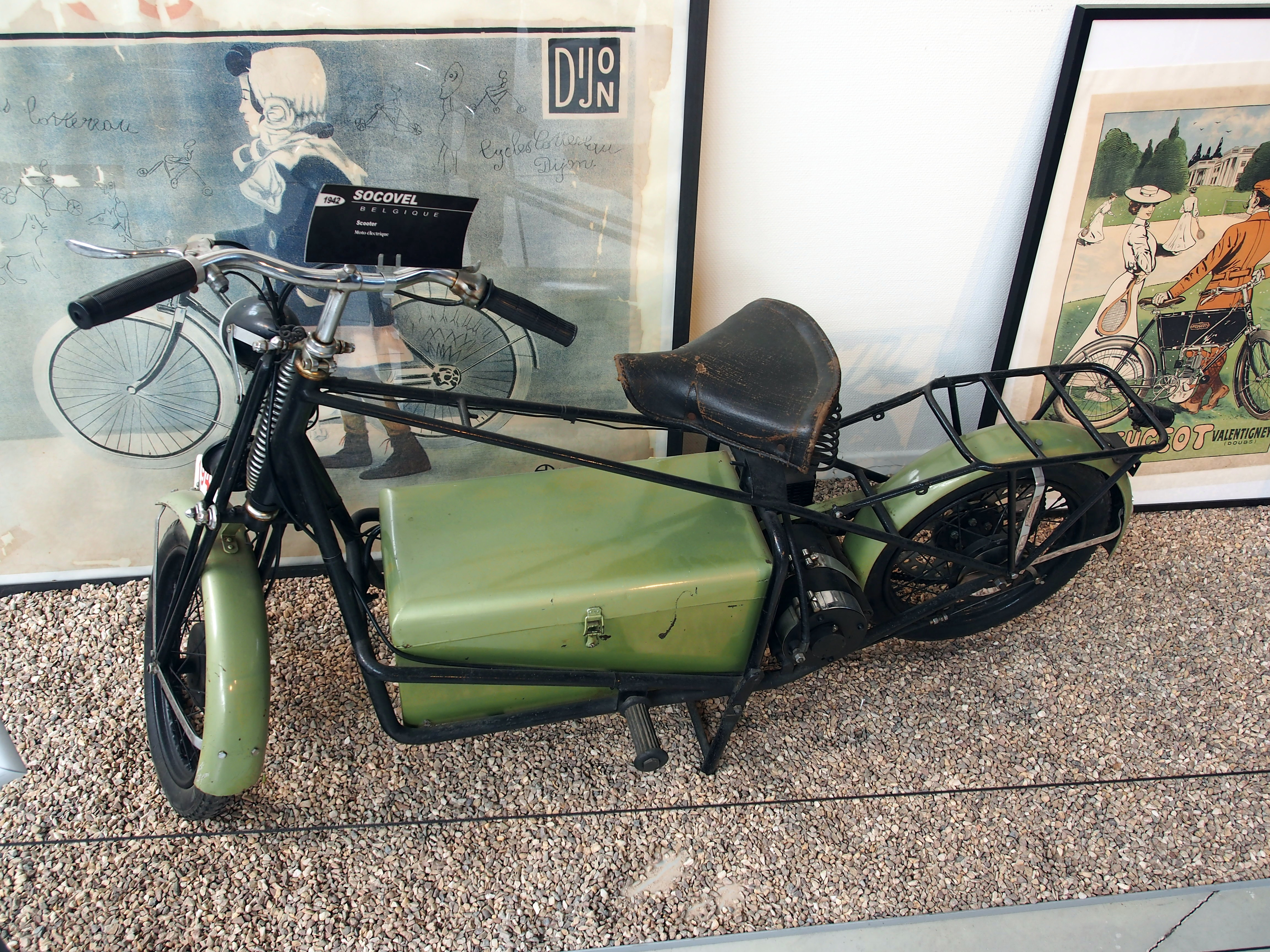 Photographed at the Musée de la Moto et du Vélo, Amneville, France.